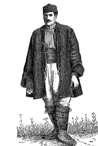 Сељак из лесковачке околине. Народне ношње. новинска ксилографија. 1896. Владислав Тителбах